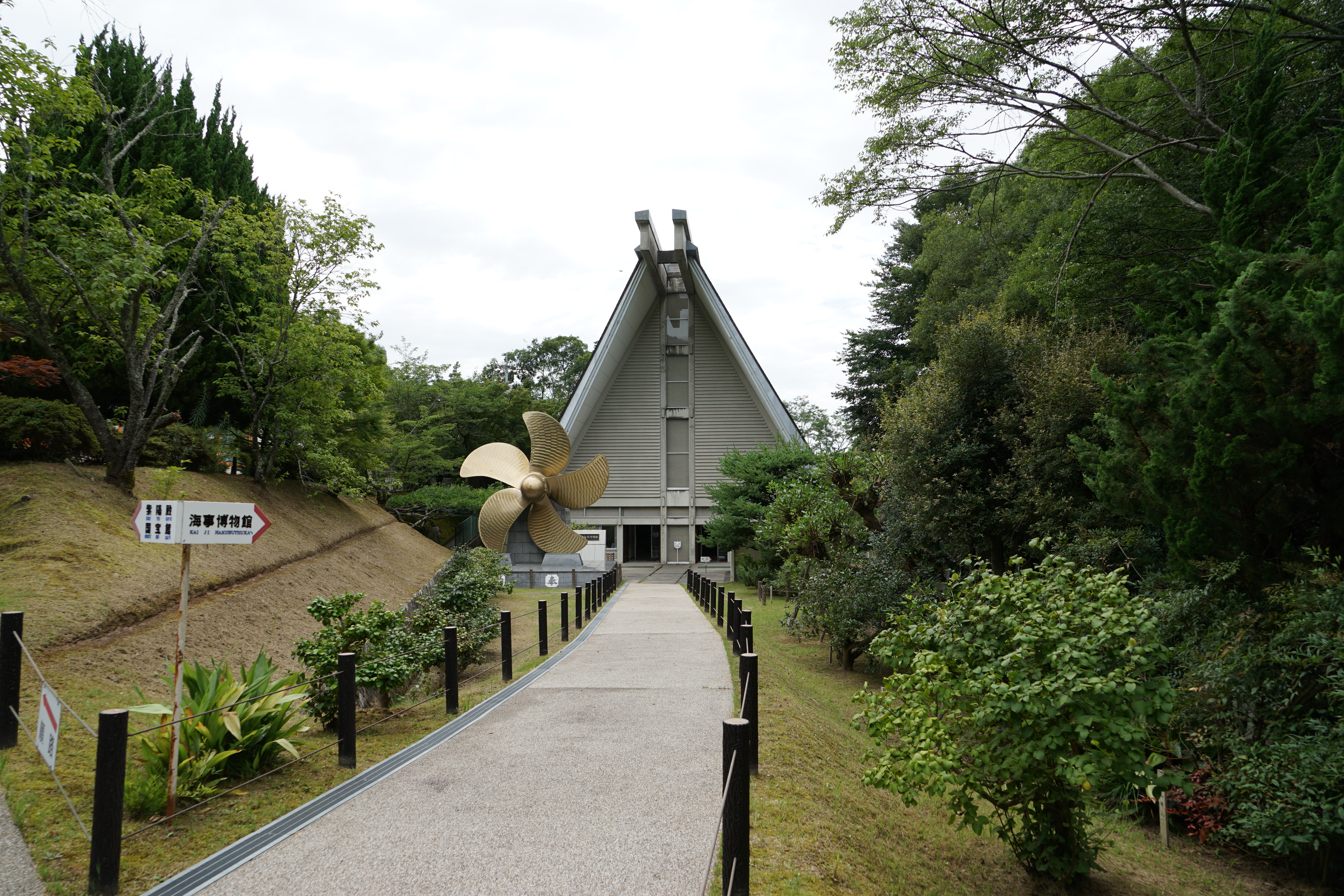 昭和天皇の研究を展示した大三島海事博物館。大山祇神社宝物館の内の一つ。